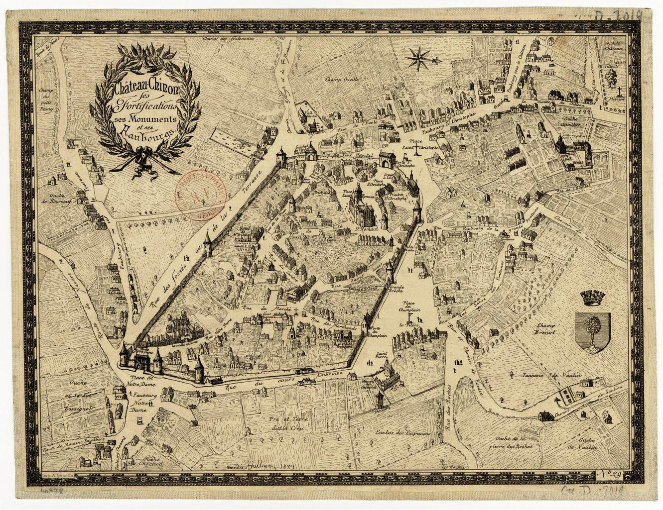 Plan de Château-Chinon en 1879. Ses fortifications, ses monuments, ses faubourgs.